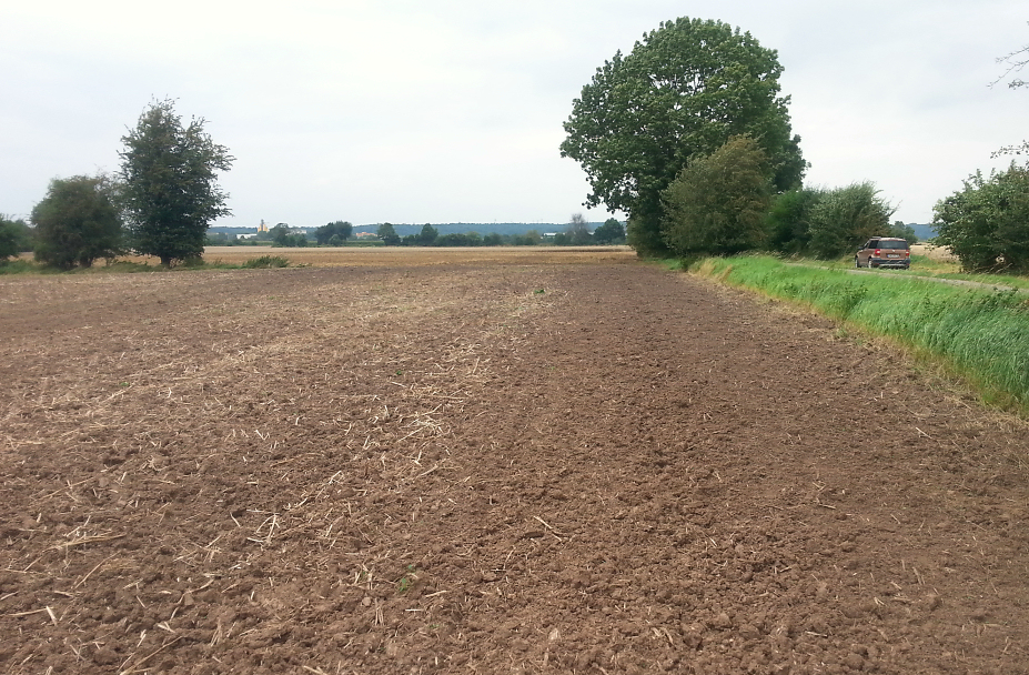 Früherer Standort der Burg Neuhaus bei Liebenau, heute Ackerfläche